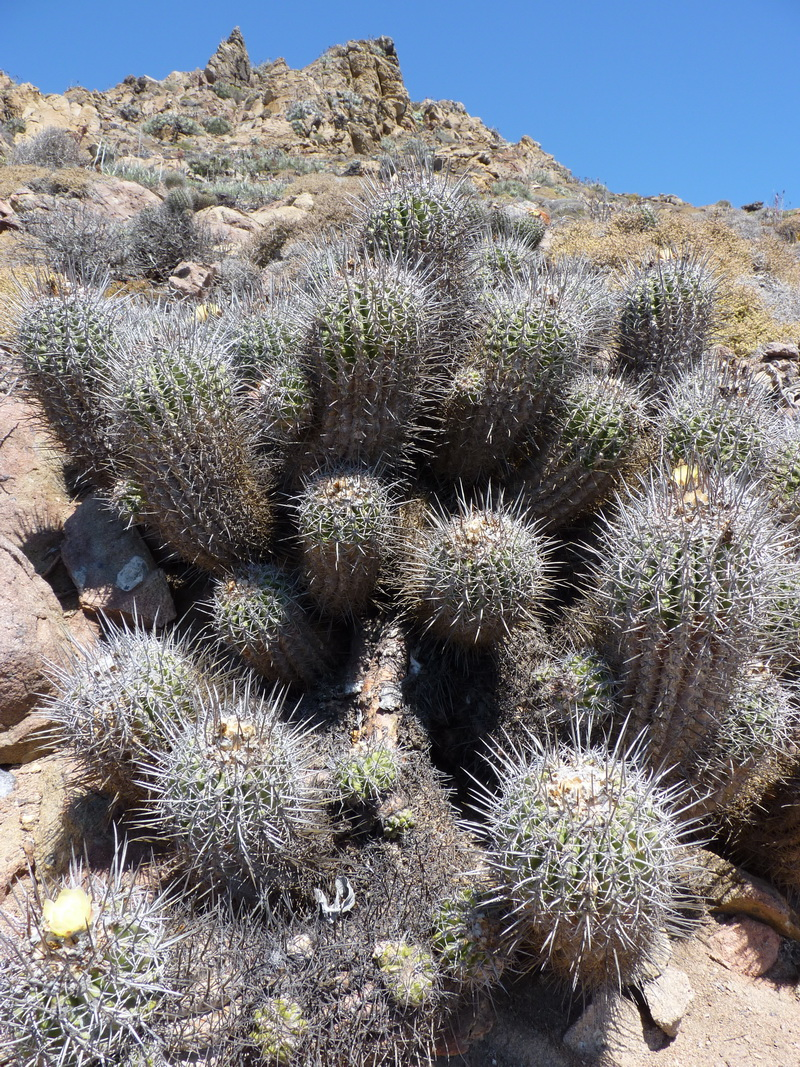 Copiapoa coquimbensis_3